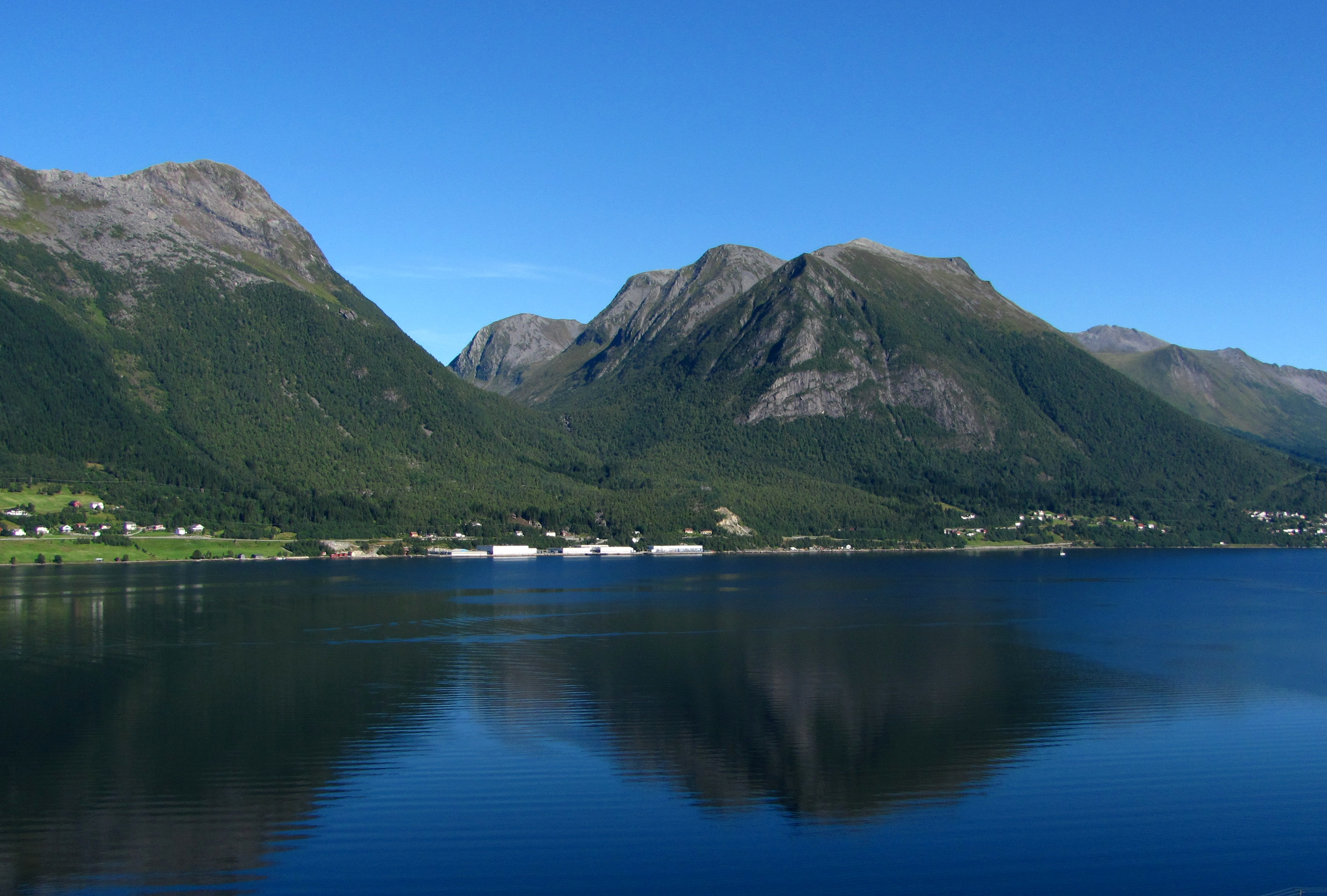 Ørstafjorden, Liadalsnipa, Skorgedalen, Saudehornet i Ørsta, Møre og Romsdal